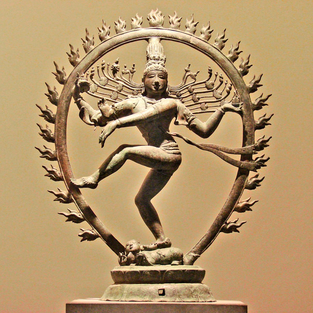 Shiva Natarâdja, Seigneur de la Danse Tamil Nadu Eposue Cola, XIème siècle Bronze, musée Guimet Shiva accomplit la danse cosmique de la destruction et de la création de l'univers. La danse cosmique symbolise le renouvellement périodique du monde, en un rythme infini de dissolutions et de naissances. Pour les hindous, la danse est plus ancienne que le monde lui-même car c'est précisément en dansant sur le mont Kailasa que Shiva créa le cosmos et notre Âge, en prenant cette posture au moment de la création, posant le pied droit sur la tête du démon primordial, Apasmârapurusa, symbole d'ignorance et de cécité, et le tue. Sa chevelure se déploie sauvagement tandis qu'il danse, transporté par le rythme du petit tambour en forme de sablier ou de clepsydre (damaru) qu'il tient dans la plus haute de ses mains droites. Ce rythme est la pulsation du cosmos (mâyâ) qui naît à la vie grâce à l'action bénéfique de la danse créatrice, en créant, à chaque battement, l'air, le feu, l'eau et la terre, et réveillant ainsi la vie ; mais c'est de cette même danse que jaillira l'étincelle qui détruira le monde. Le cosmos est figuré par le cercle qui contient la divinité ; il jaillit des bouches fertiles du makara placé sur le socle de la statue. Le moment de la création du cosmos est donc associé à sa destruction simultanée, symbolisée par les flammes qui bordent le cercle et la flamme unique que le Dieu tient dans sa main gauche supérieure. Cette flamme unique réduit tout à néant : elle fait écho au tambour créateur de la main droite supérieure. (Wikipedia)